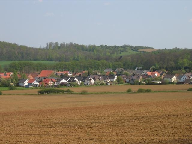 Ansicht von Borlinghausen vom Eggegebirge aus